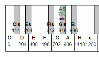 12-stufige Tastatur mit Angaben in Cent der pythagoreischen Stimmung